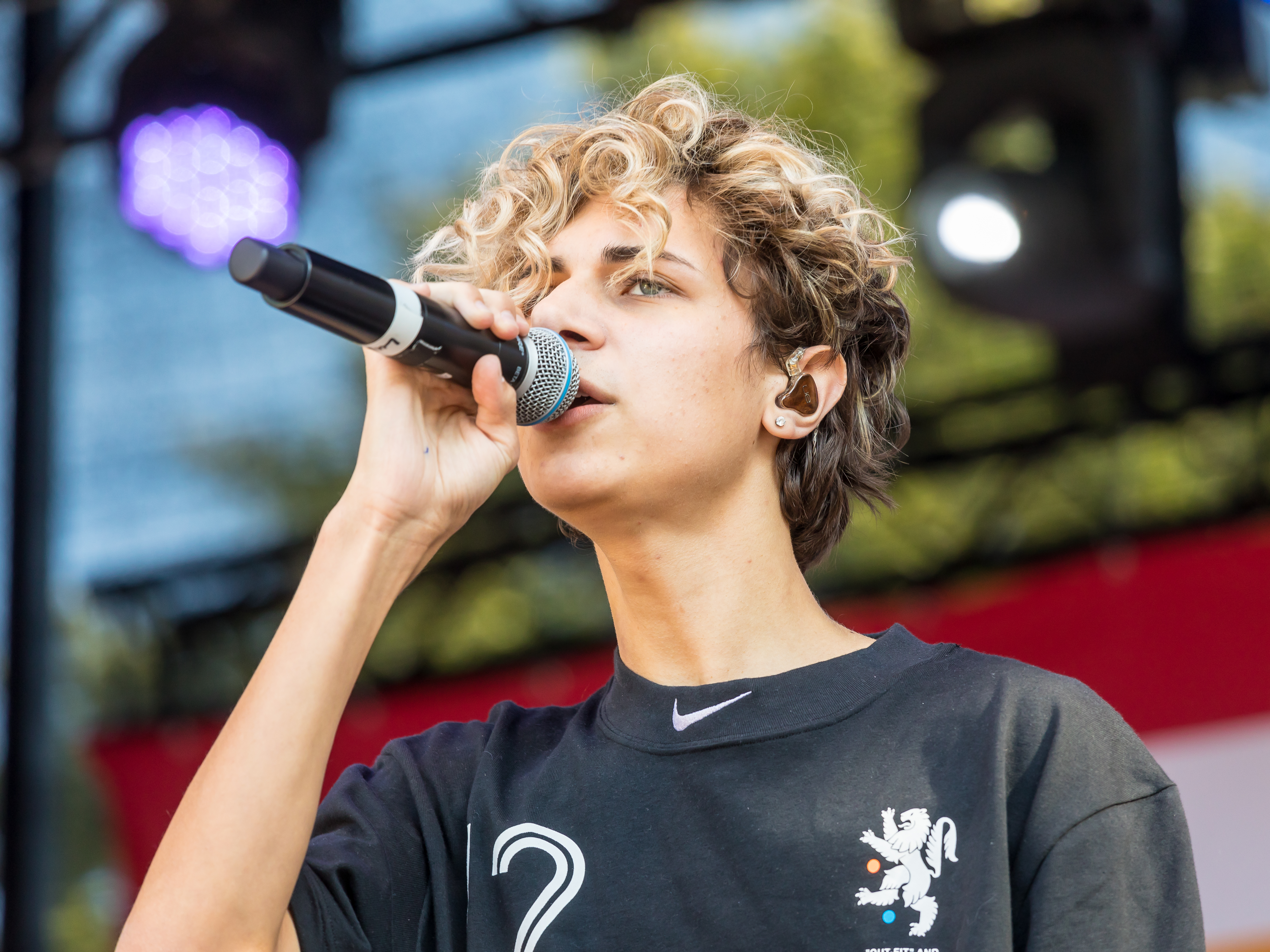 ColognePride/CSD 2018 - Auftritt von Lukas Rieger auf der Hauptbühne, Heumarkt